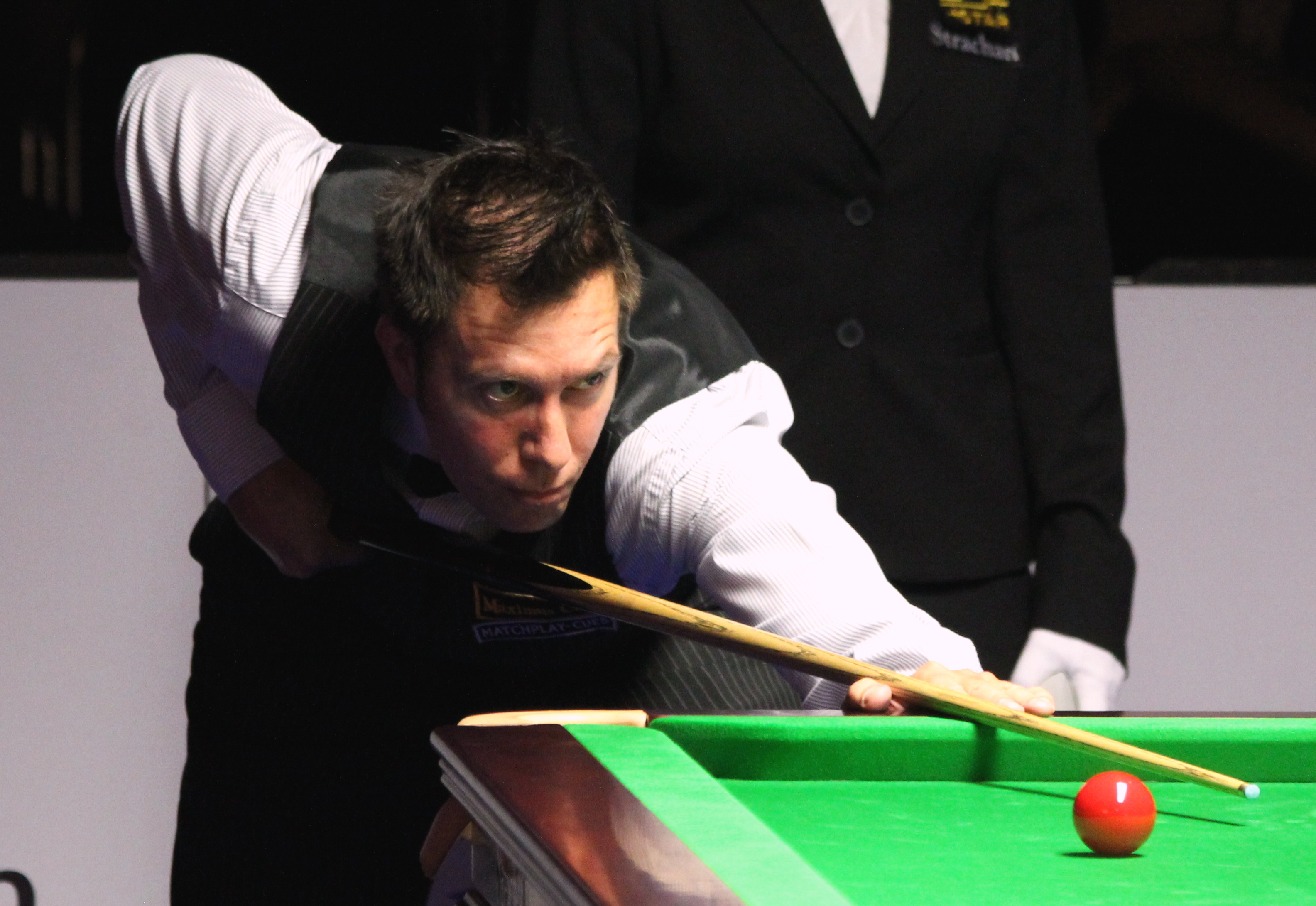 Dominic Dale beim Paul Hunter Classic 2016